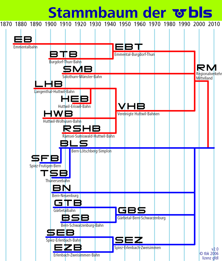 Stammbaum der BLS. Es fehlt noch die Bödelibahn (BB), eröffnet 1872 und 1900 von der TSB absorbiert.